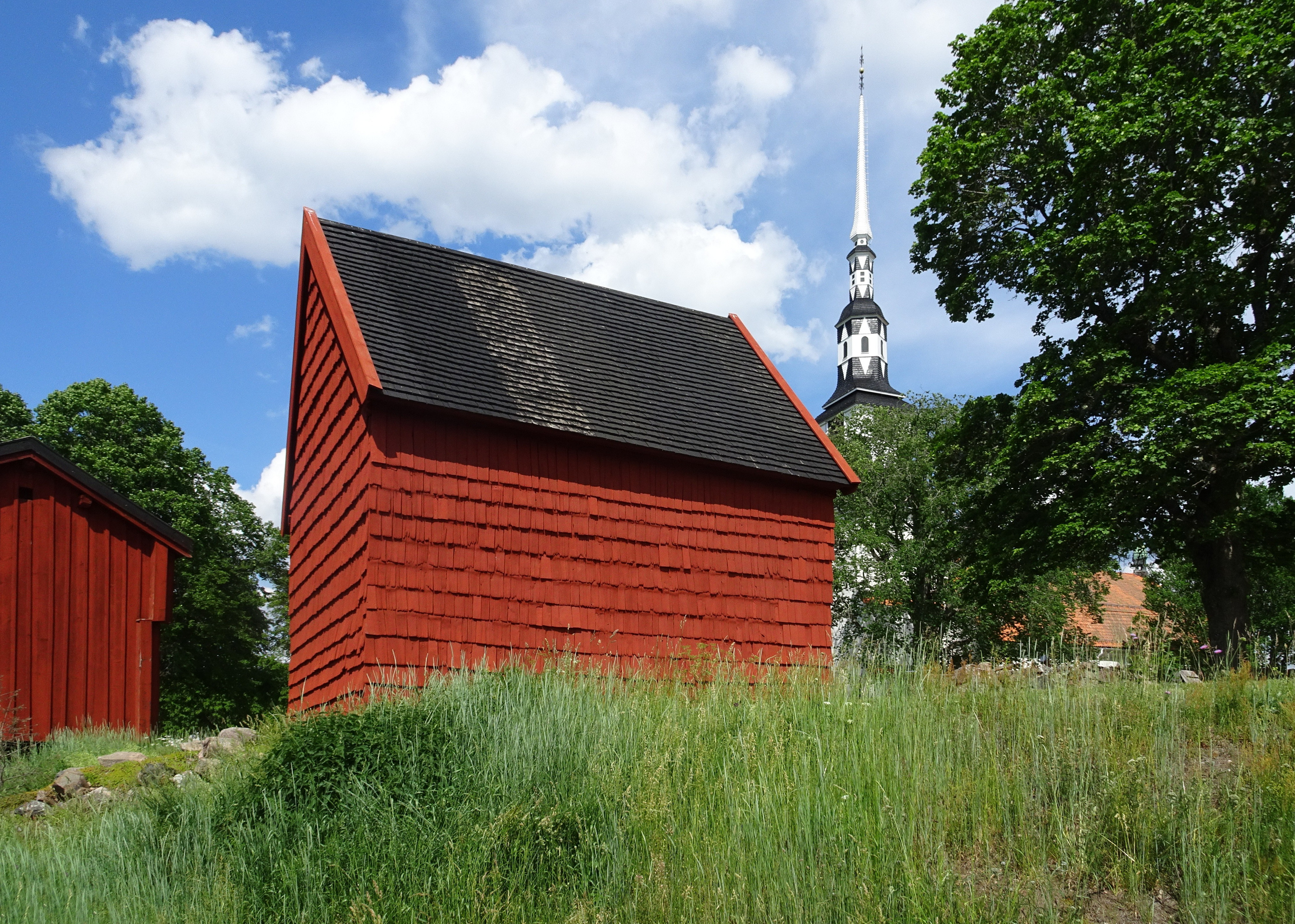 Kyrkboden i Ingatorp, daterad till 1229 (+/-10 år). För närvarande Sveriges äldsta daterade profana byggnad.